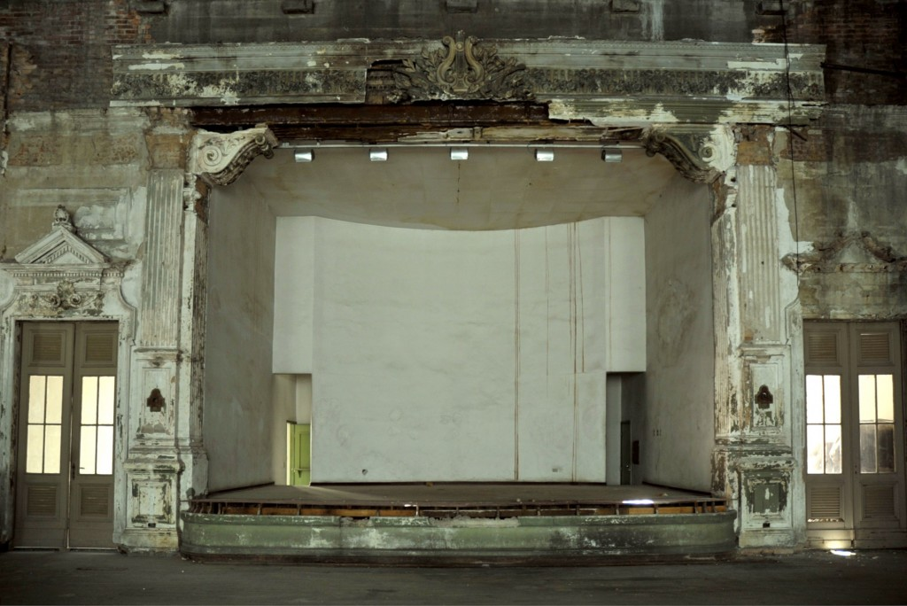 Palco da Sala do Conservatório antes da restauração. O local é sede oficial do Quarteto de Cordas da Cidade de São Paulo. Durante muitos anos abrigou o Conservatório Dramático e Musical de São Paulo.